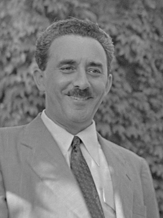 Moshe Sharett, de eerste minister van buitenlandse zaken van de staat Israel, schudt de hand van een onbekende man met op de achtergrond de Israelische vlag 1948